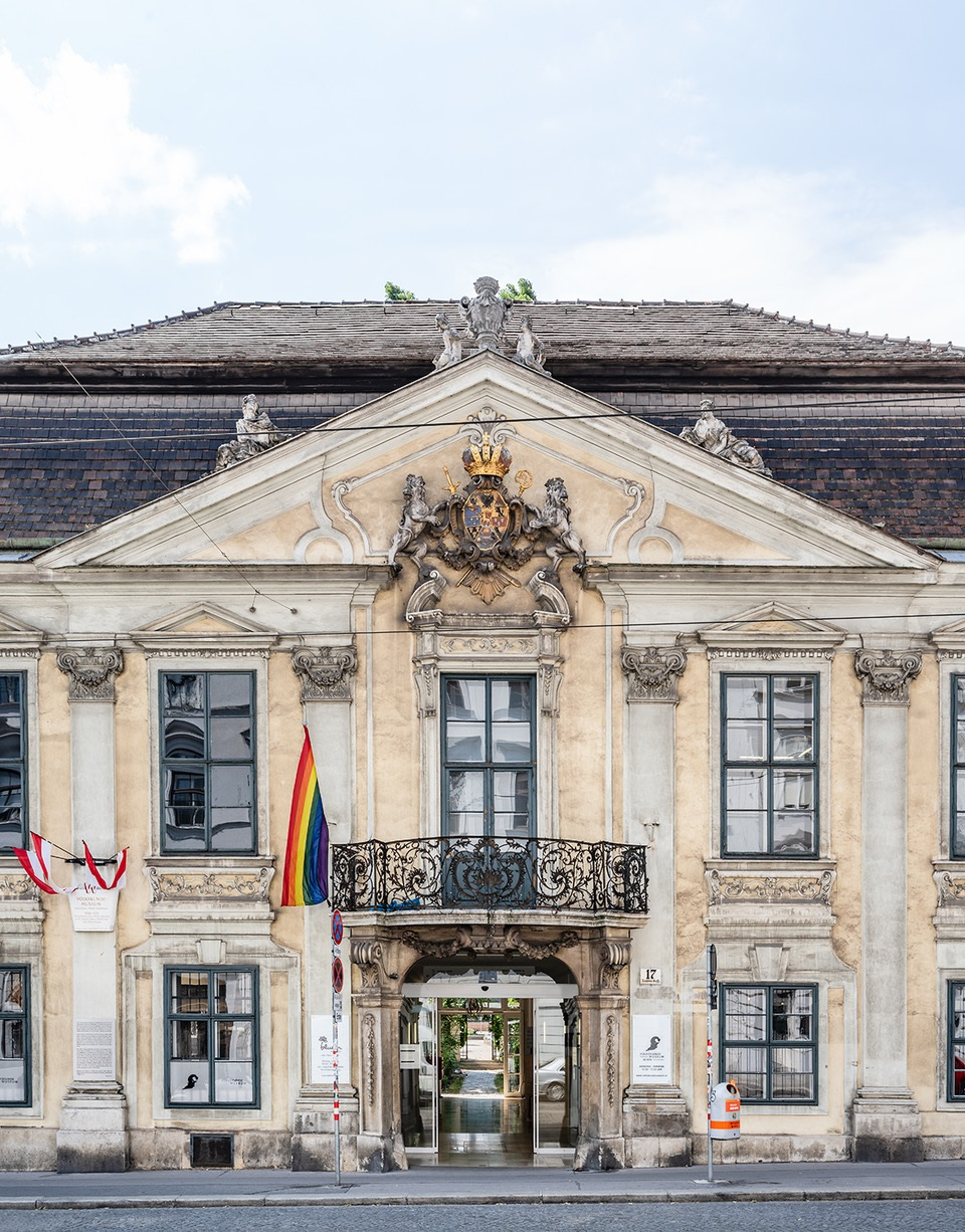 Foto: Matthias Klos